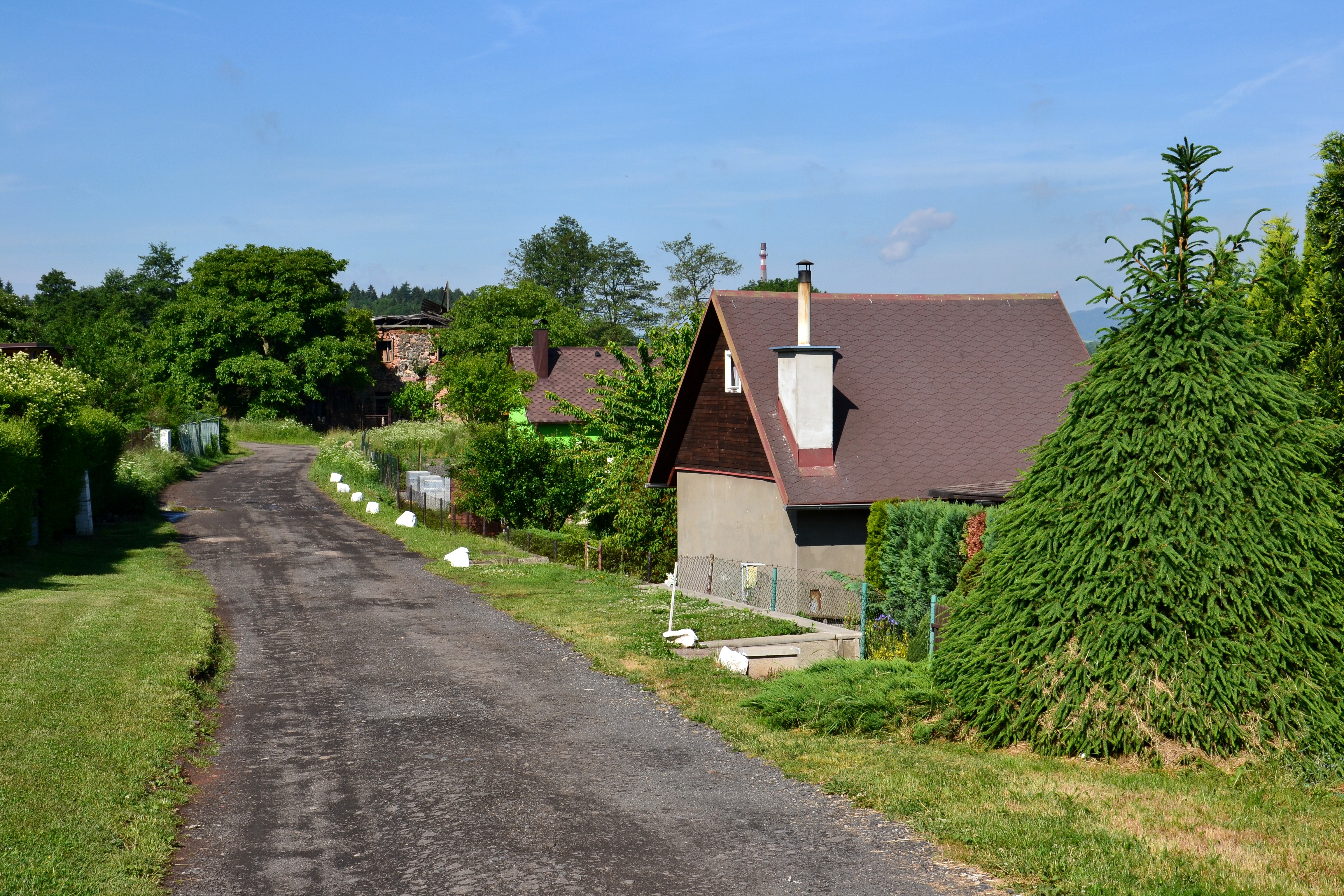 Zahrádky se zříceninou domu v Liticově